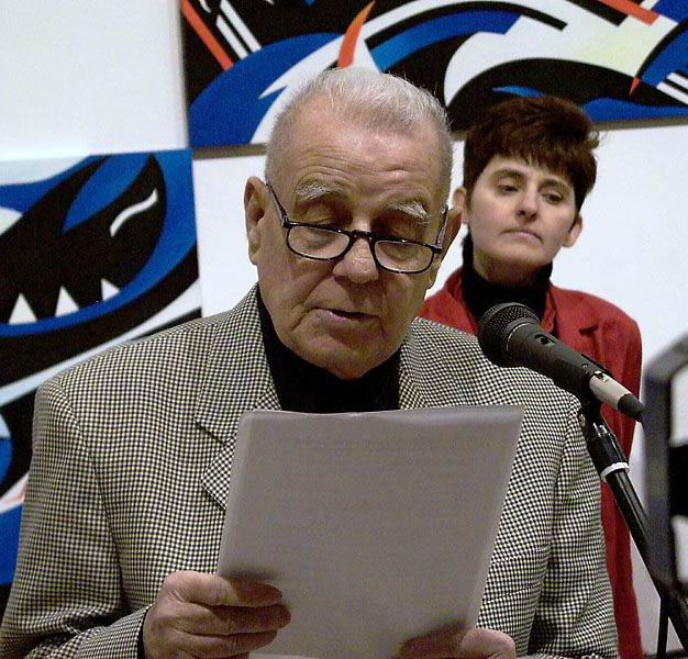 Kass János megnyitja Keresztes Dóra kiállítását, Dorottya galéria, Budapest